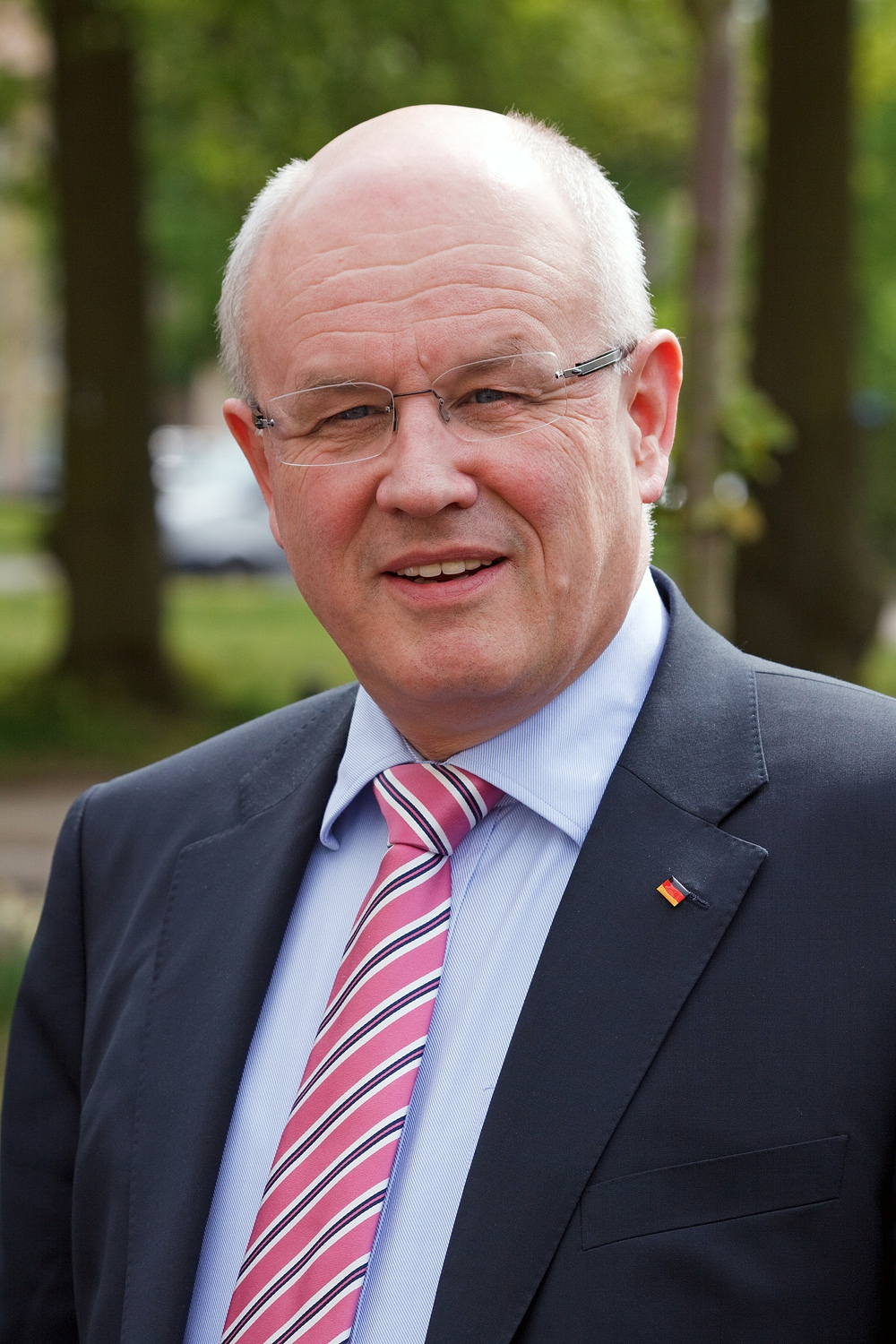 Volker Kauder, Vorsitzender der CDU/CSU-Bundestagsfraktion, während einer Wahlkampfveranstaltung in Hamm